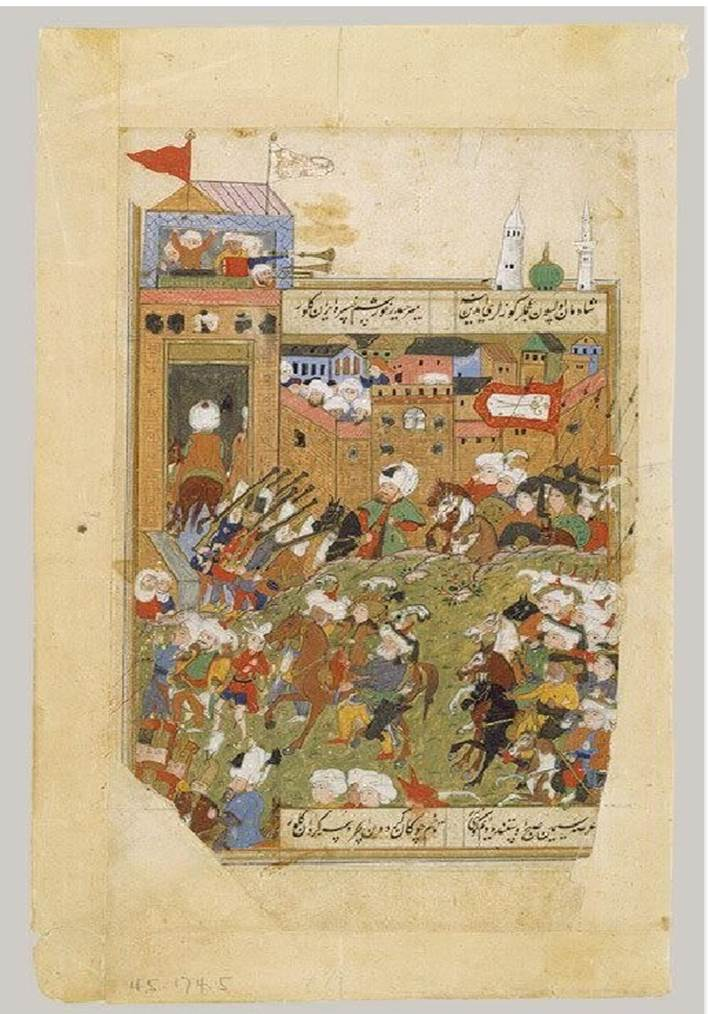 1590-cı il Heydər Mirzənin İstanbulda qarşılanması. Bakinin əsərinə çəkilmiş miniatür. Metropoliten Muzeyi.